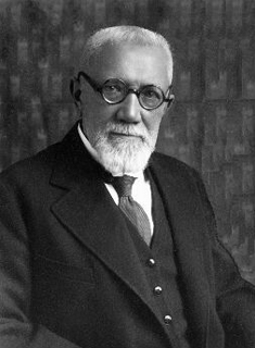 Bertold Bretholz (1862 - 1936), Německočeský historik, editor a archivář.